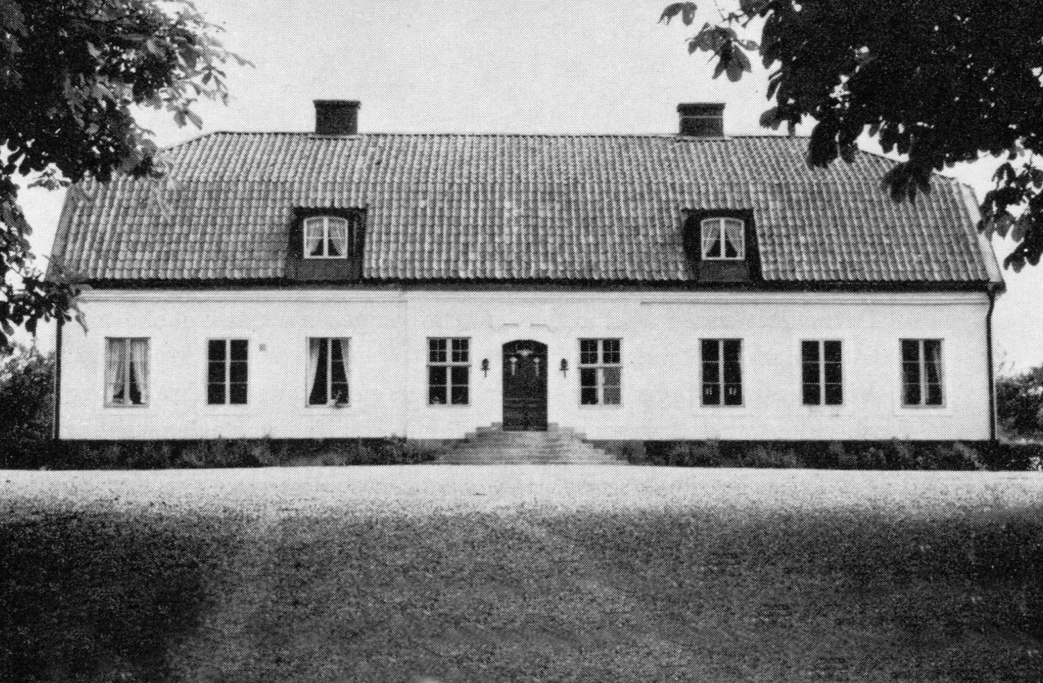 Ronöholms gårds huvudbyggnad